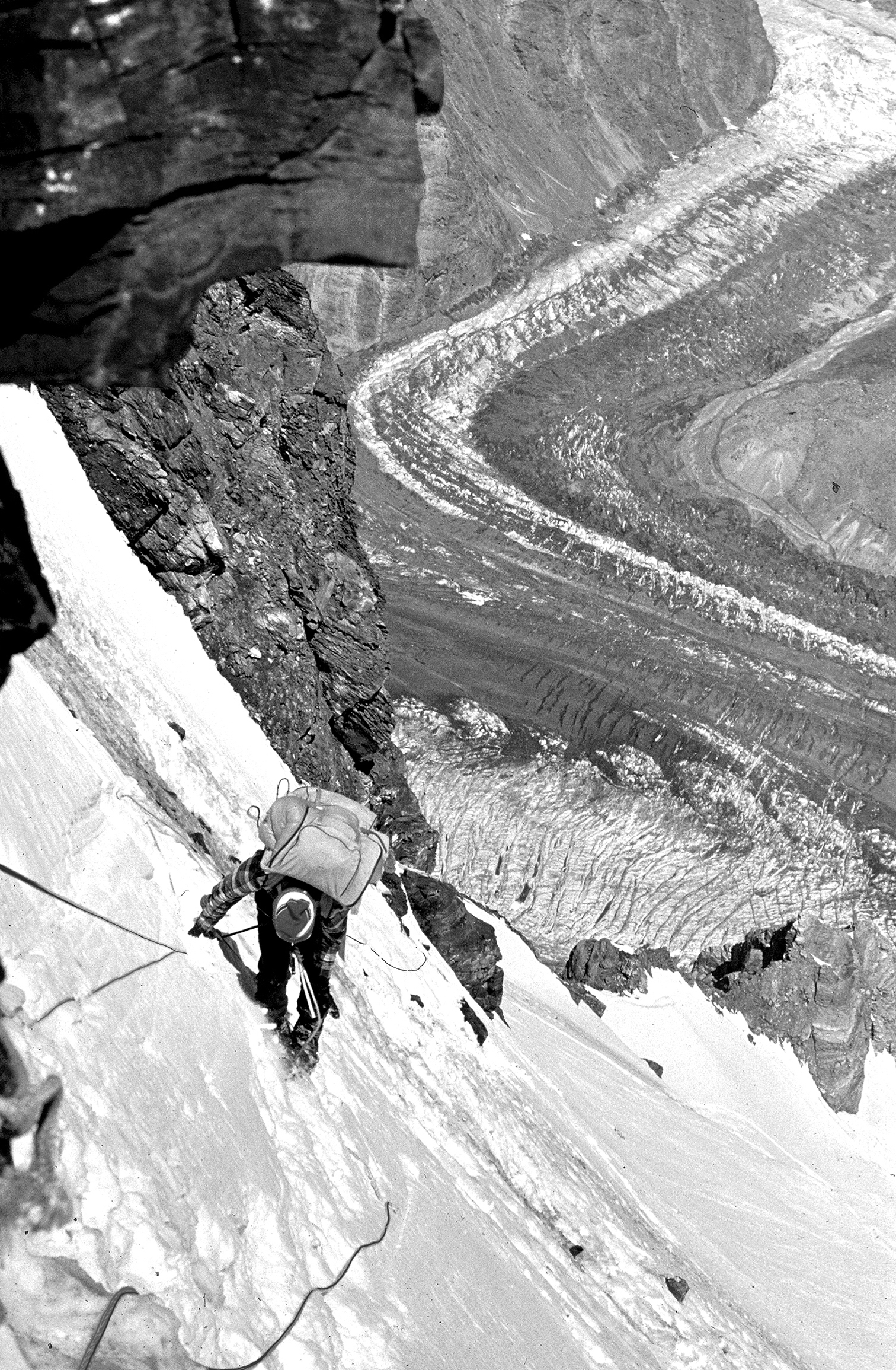 Ilmar Priimets